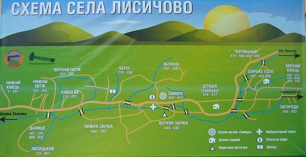 схема